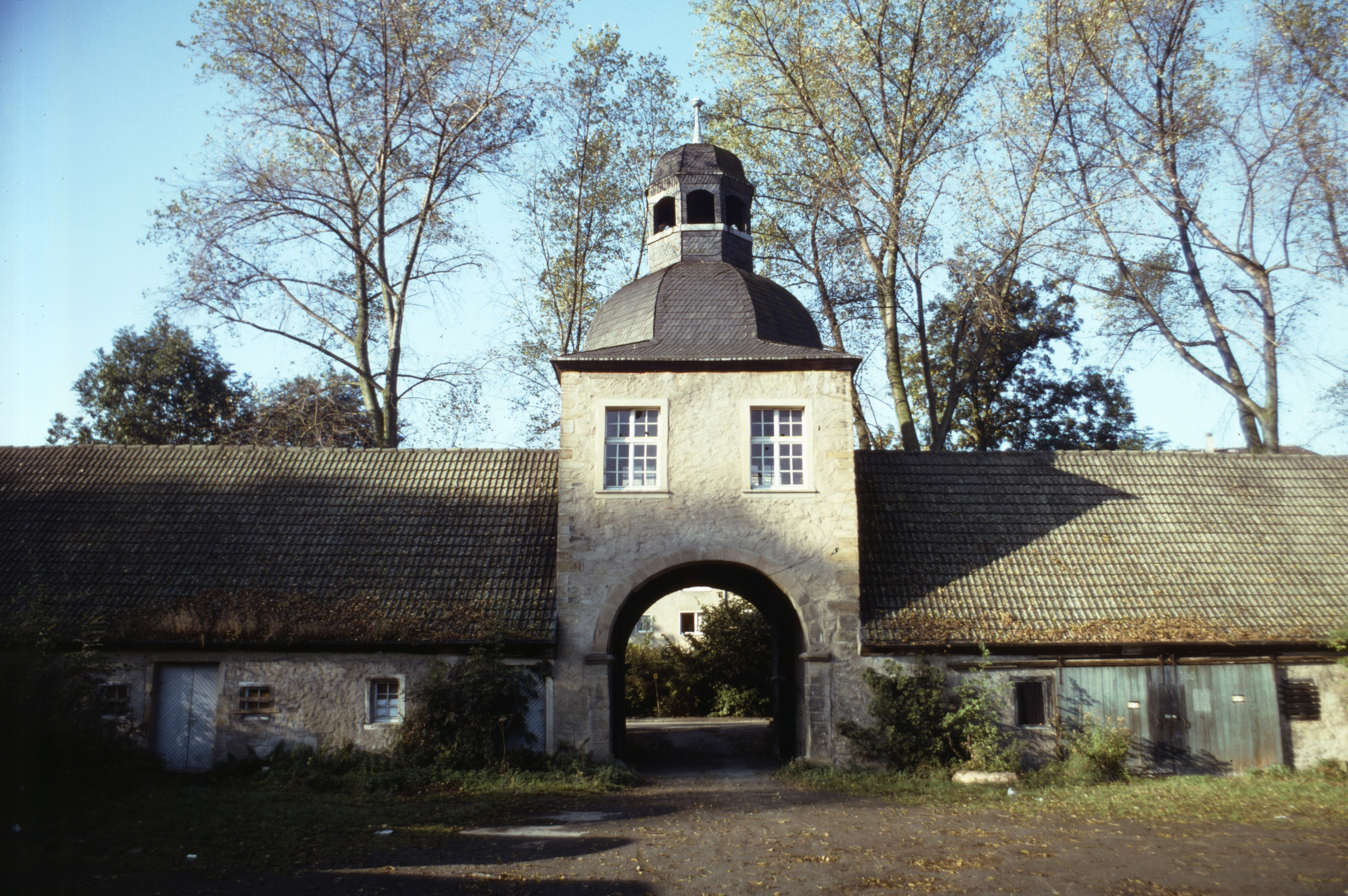 Gut Niederhofen in Dortmund-Wellinghofen 1980